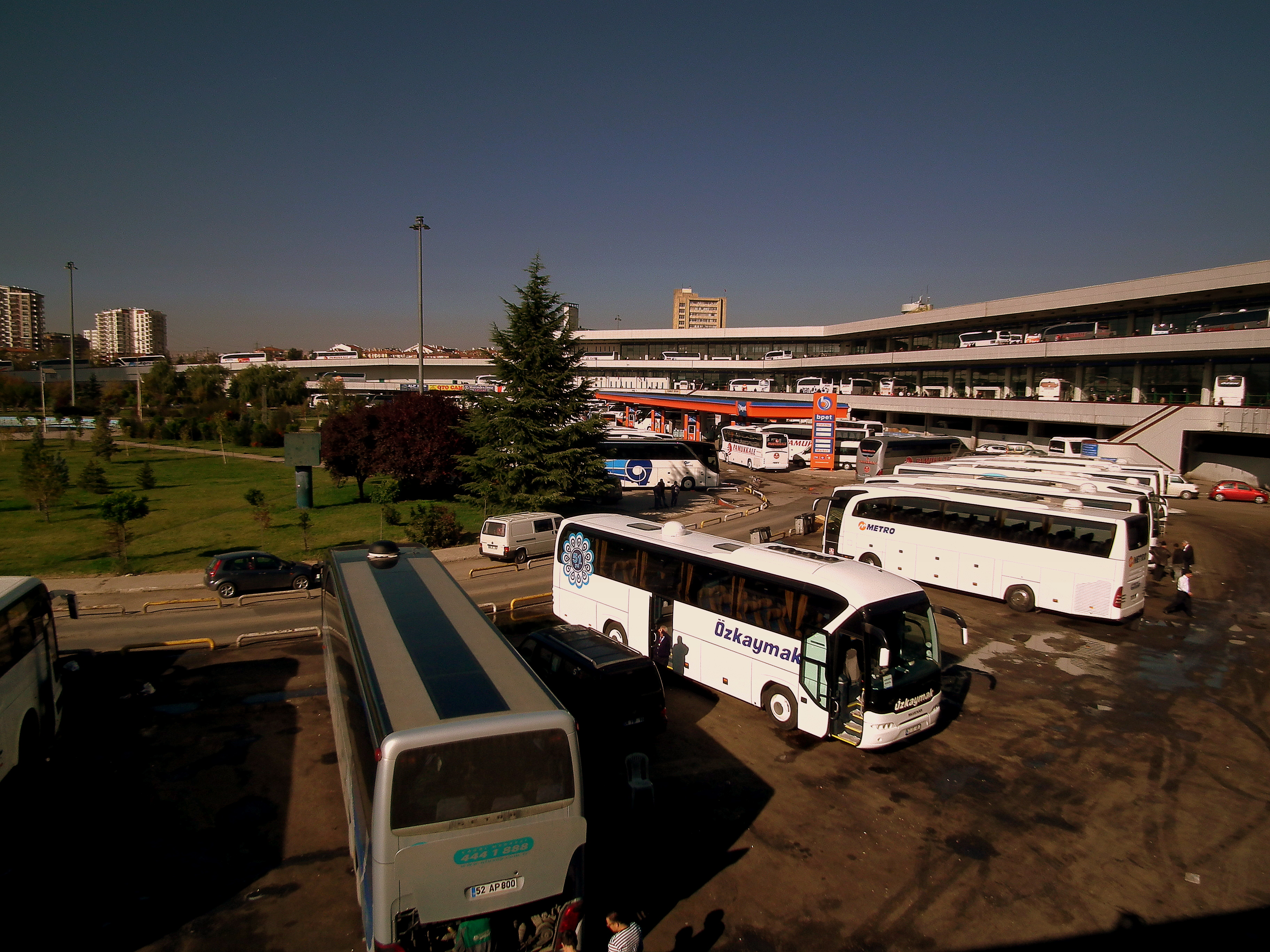 ASTI OTOGAR/BUS STATION ANKARA TURKEY OCT 2011